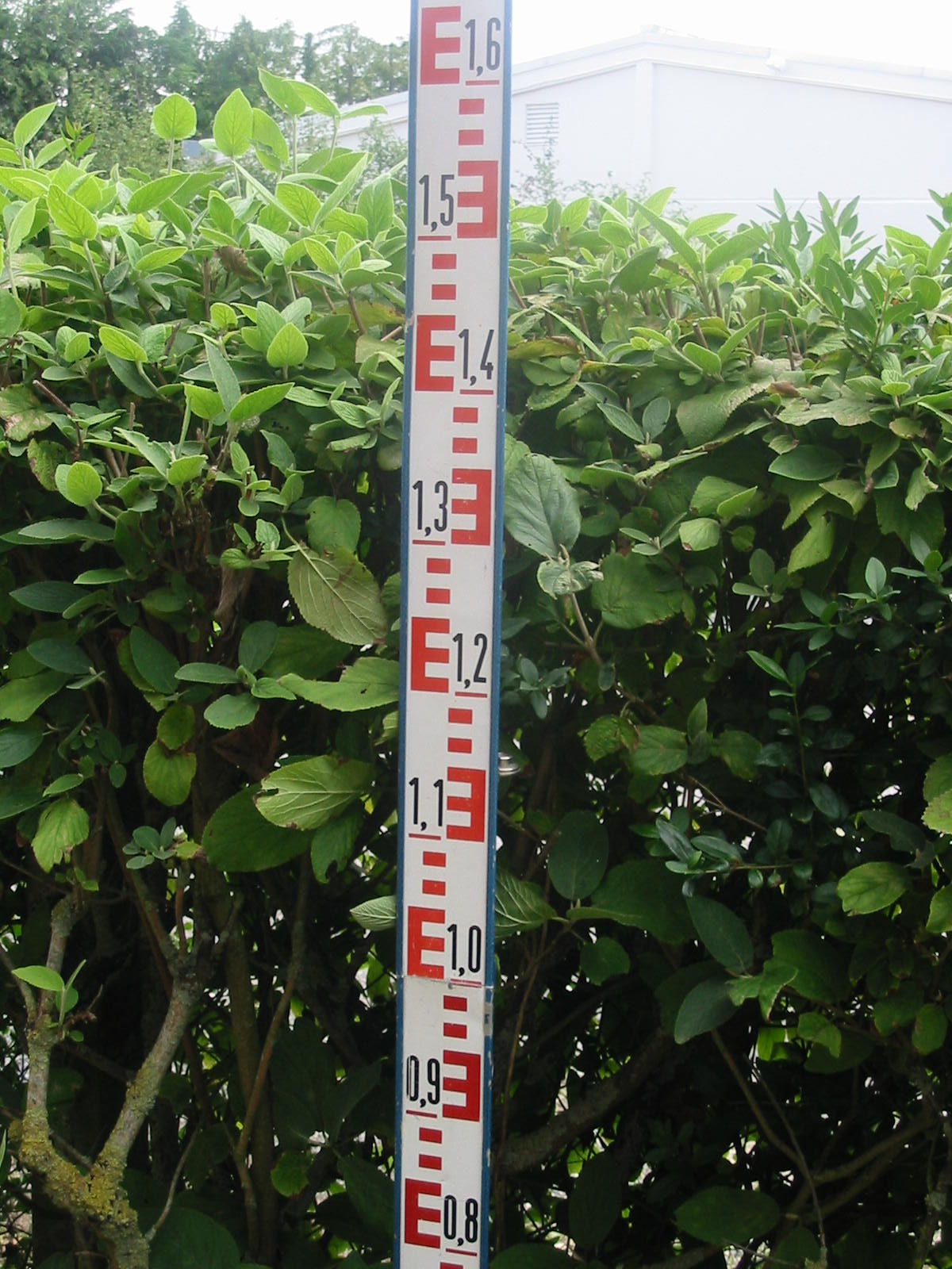 Mire graduée et sa bulle sphérique pour niveau optique